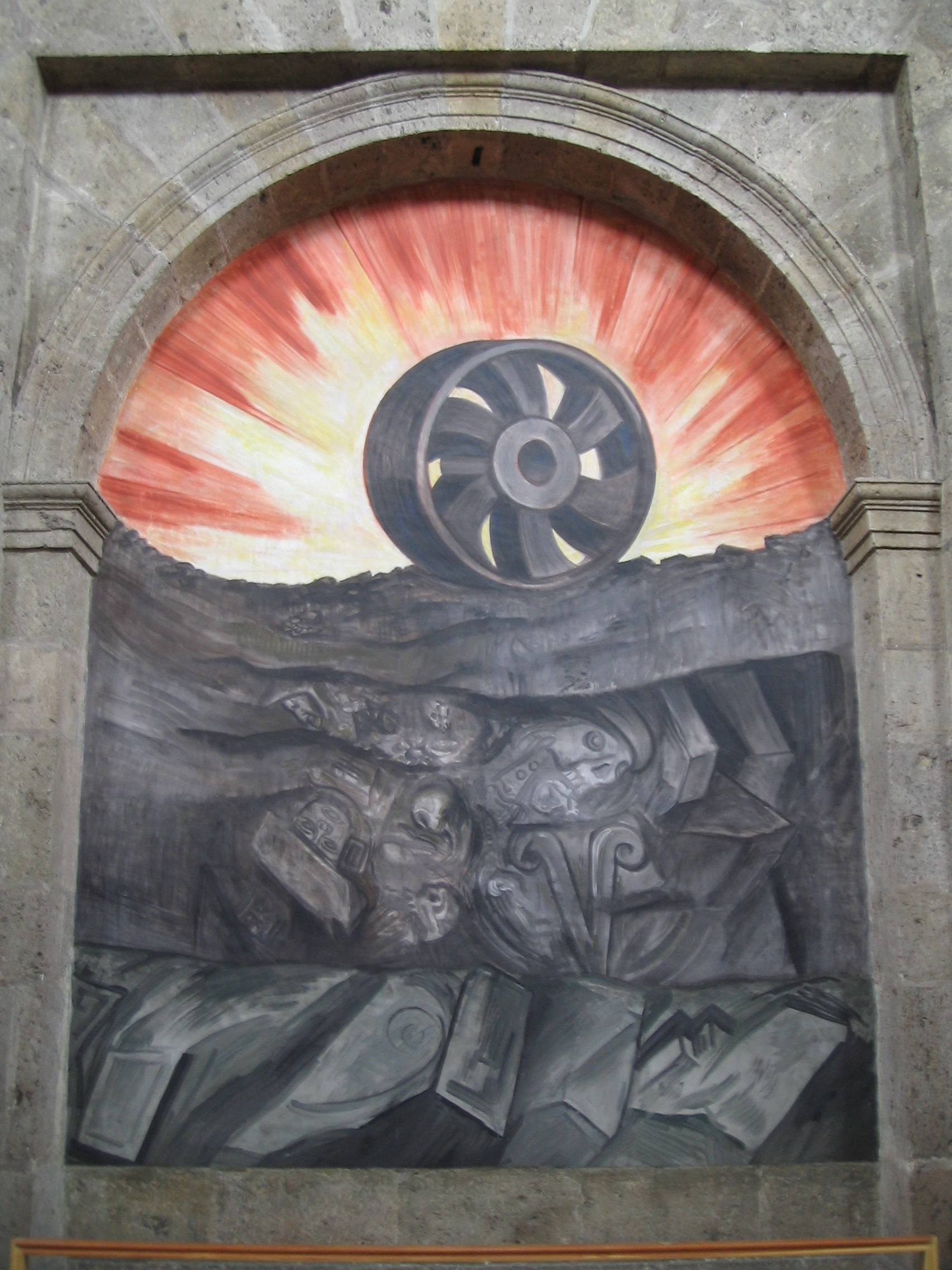 A Mural painting from Orozco in Hospicio Cabañas, Guadalajara, Mexico